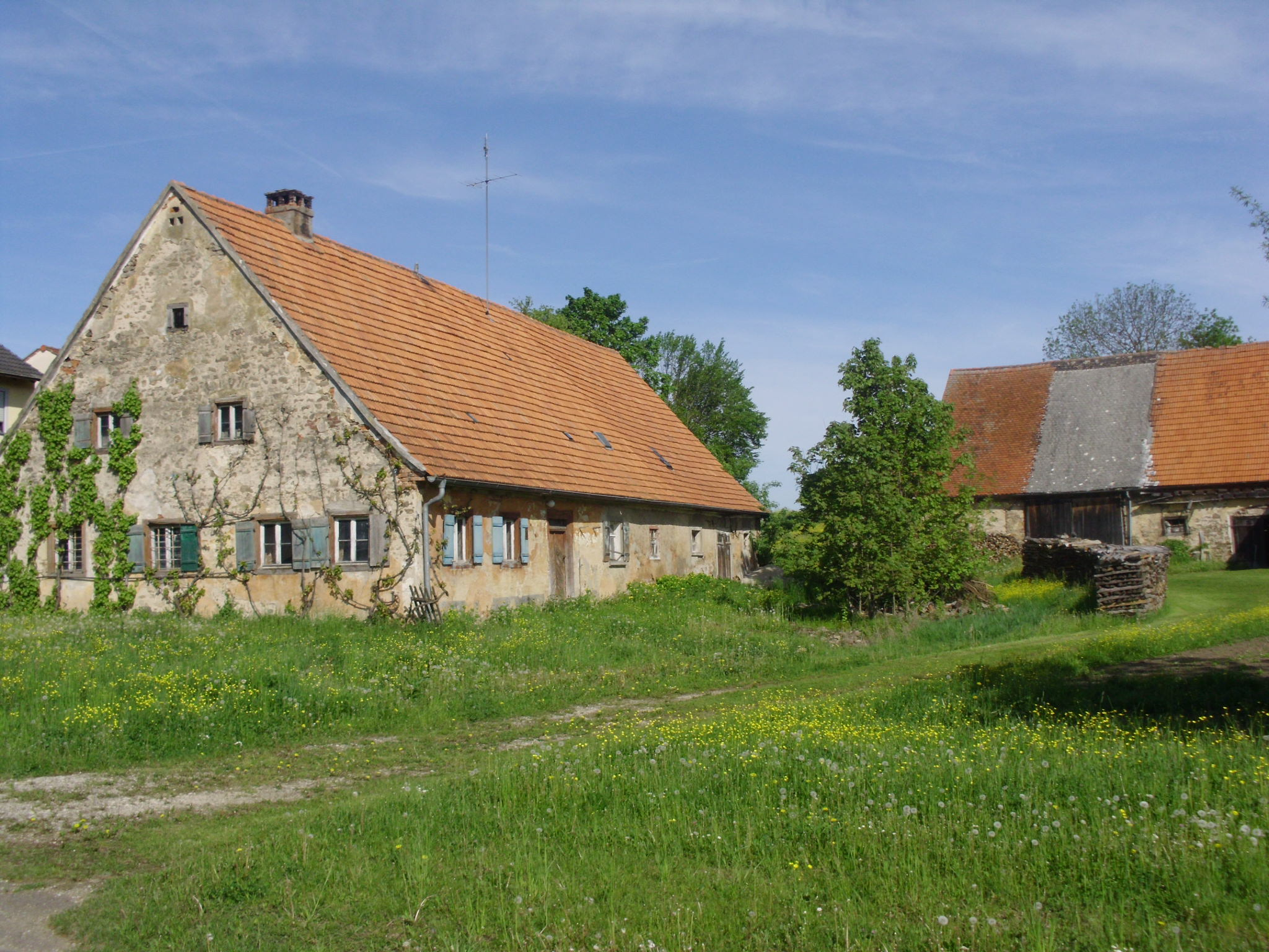 Weilerau, Ortsteil von Gnotzheim im mittelfränkischen Landkreis Weißenburg-Gunzenhausen, altes Bauernanwesen